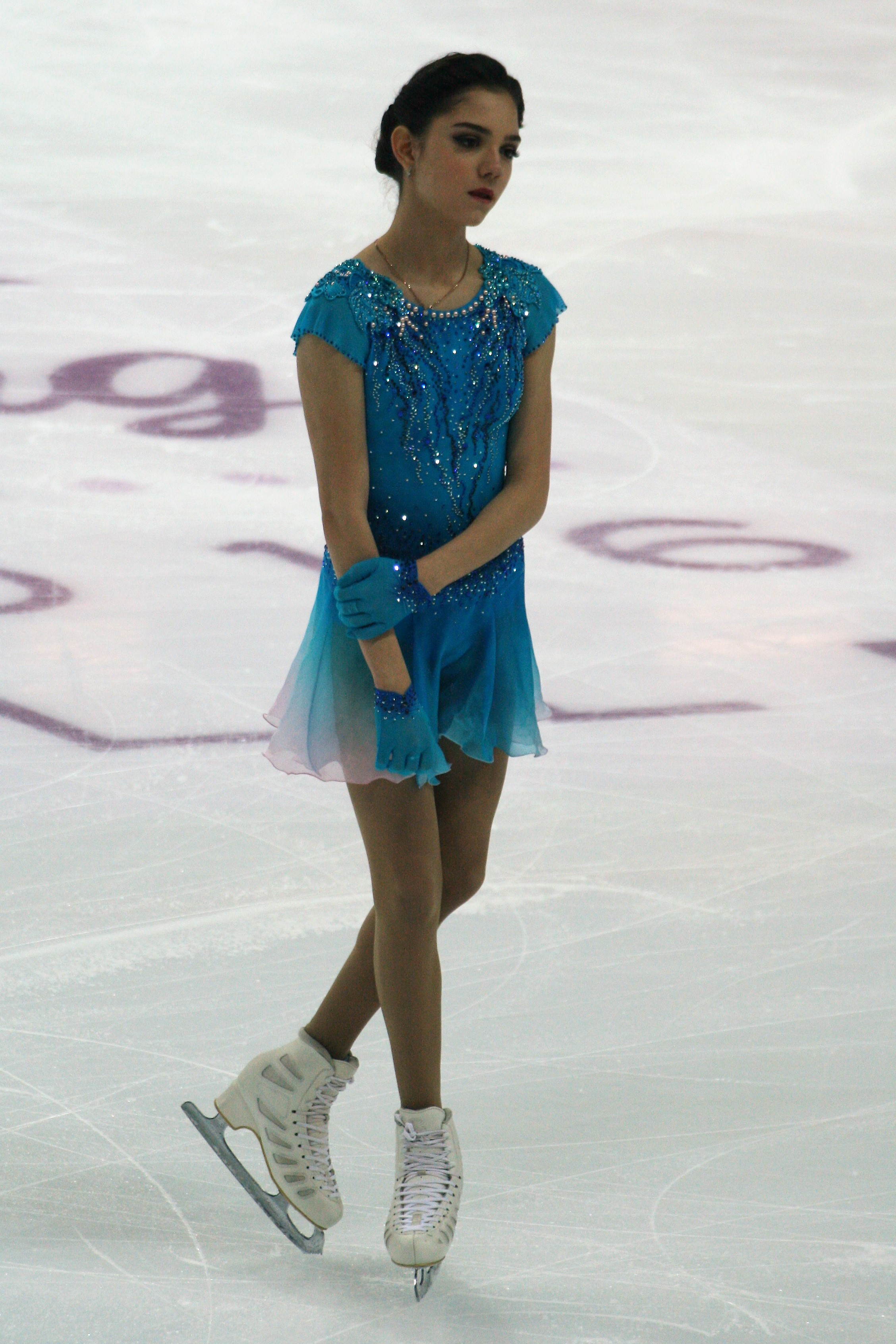 Евгения Медведева (Россия) на финале Гран-при по фигурному катанию 2016-2017